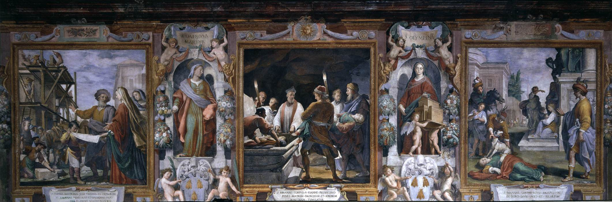 Agostino Ciampelli - Sante Martiri affresco 1622-26 Chiesa di Santa Bibiana - Roma